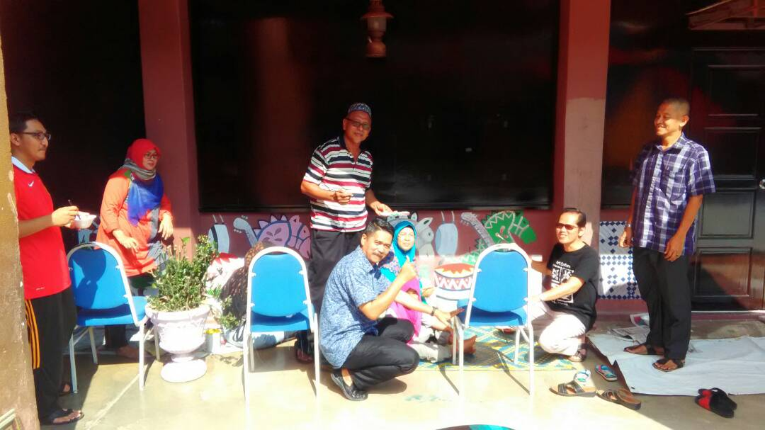 Tuan Haji Abbas, Guru Besar SK Sebatu bersama Tuan Dr. Mohd. Azam Bin Ahmad, Pegawai Pendidikan Daerah Jasin turut serta menyumbang tenaga